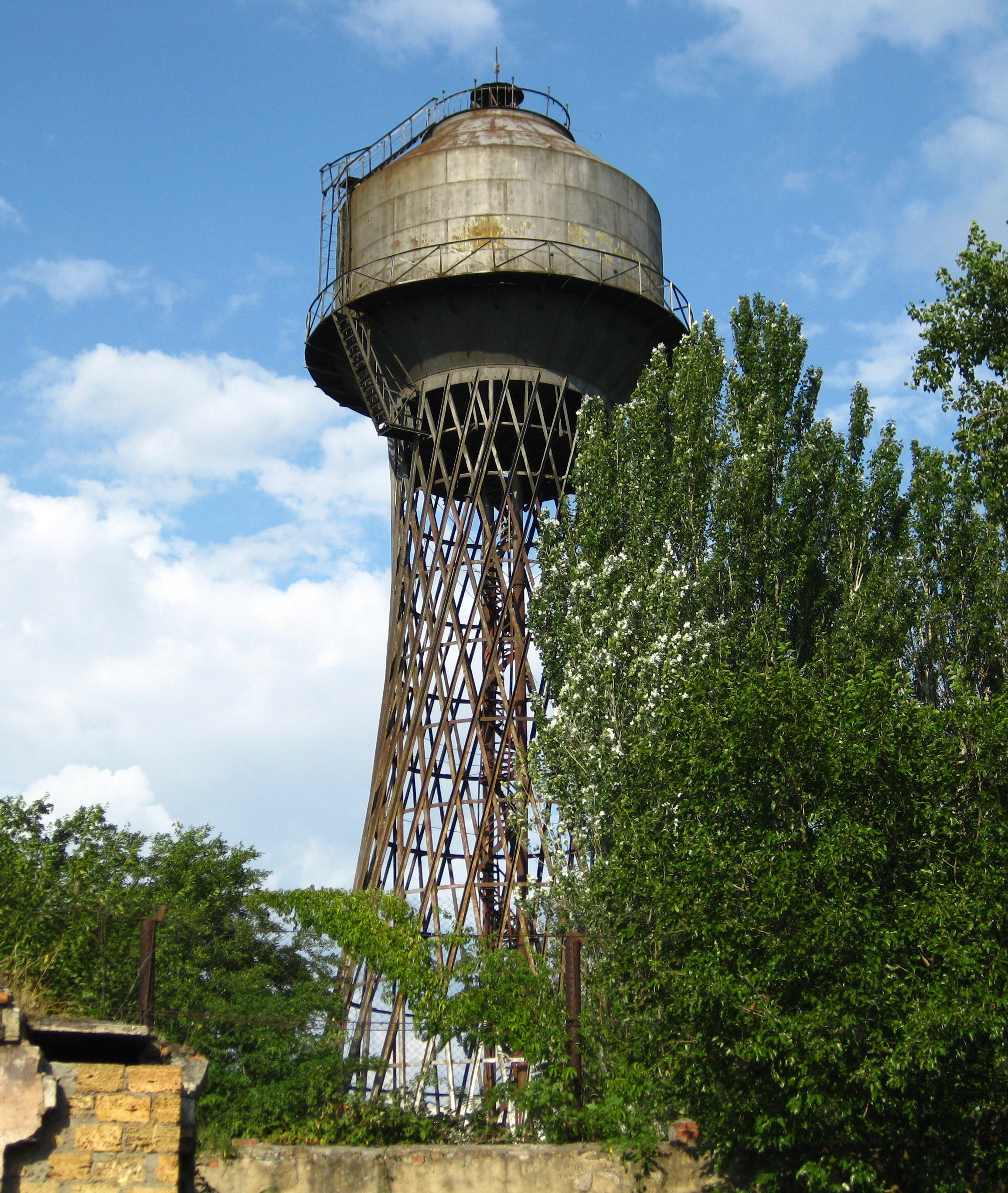 Водонапорная башня конструкции В. Г. Шухова в Николаеве (Украина)